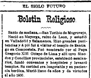 Reseña de Santo Toribio de Mogrovejo en el diario "El Siglo Futuro" de 26 de abril de 1888